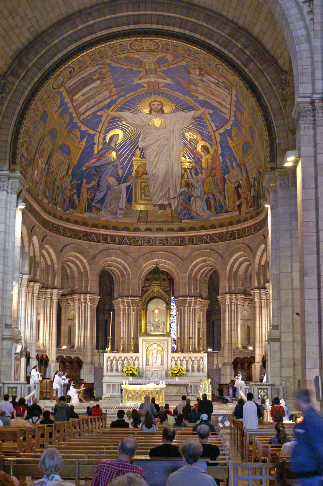 Basilique du Sacre Coeur, vue interieure du Choeur, de l'abside et de la mosaique - Basilica of the Sacré Cœur view of the Quire, Apse and Mosaic